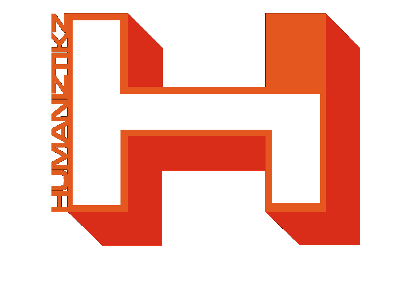 Logo wykonane dla projektu Humaniztikz przez Patryka Kościelniaka.